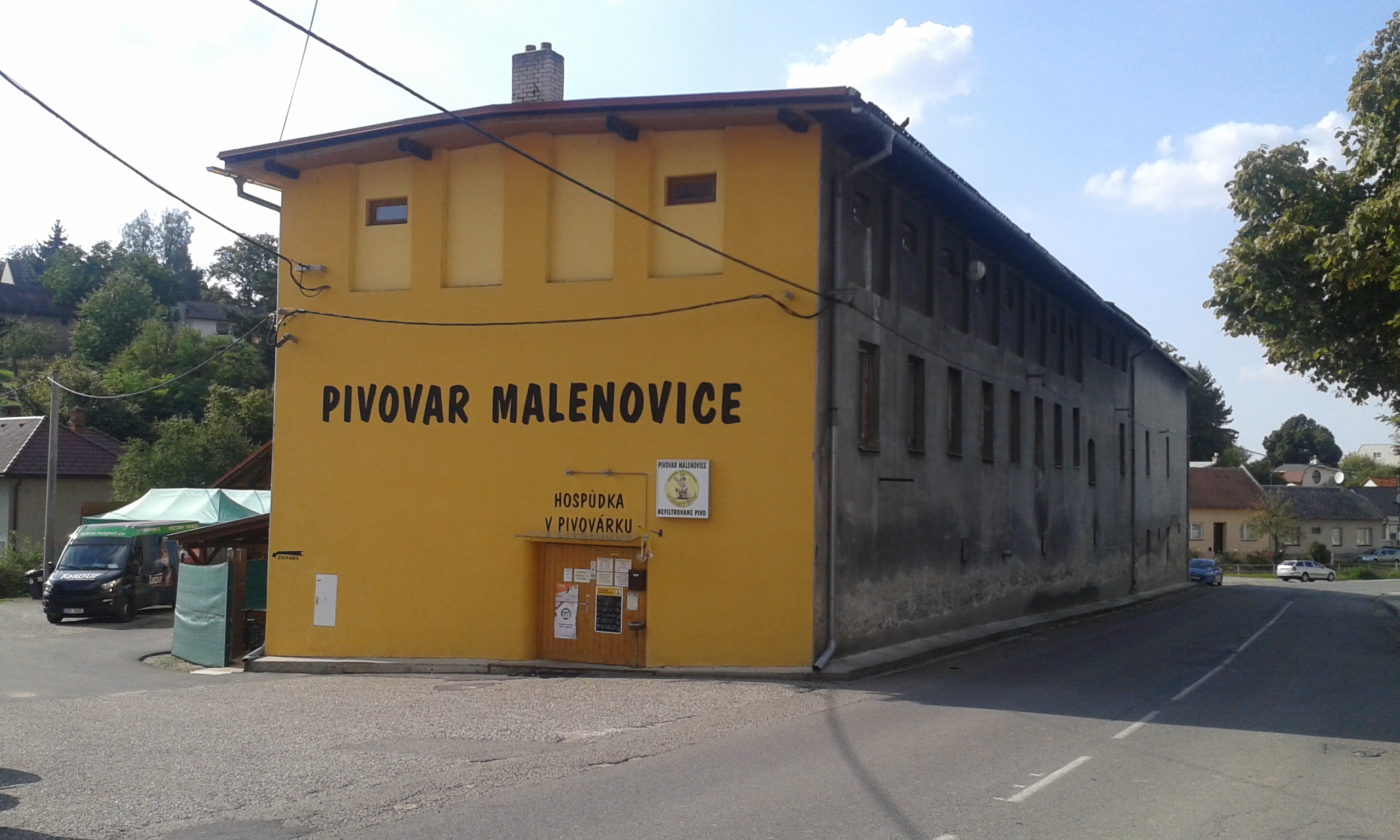 Zlínský švec – pivovar Malenovice